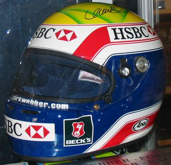 Mark Webber's 2003 helmet